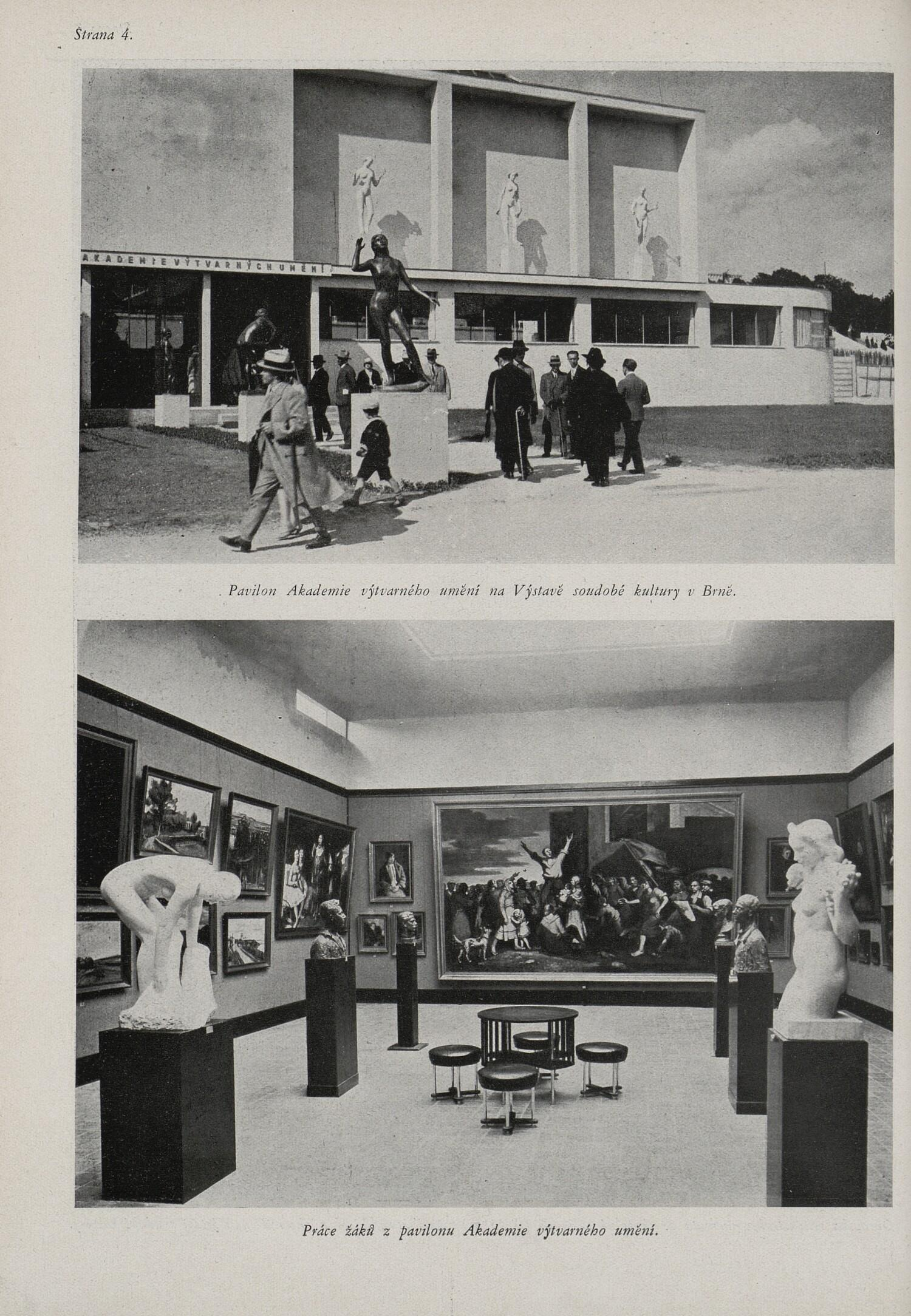 Výstava české kultury (Český svět 26. 7. 1928, s.4